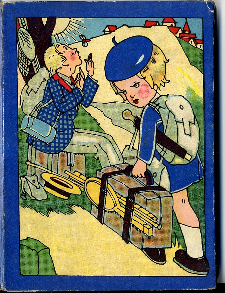 littérature illustrée pour enfant